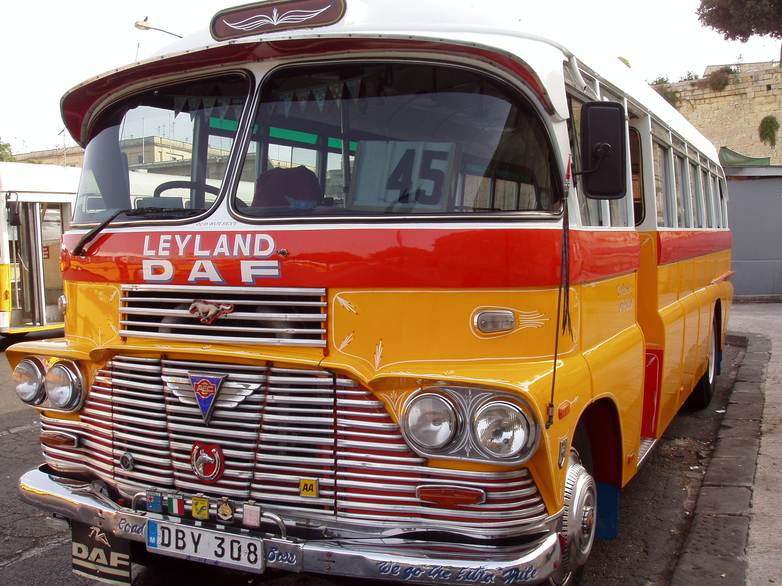 Malta bus